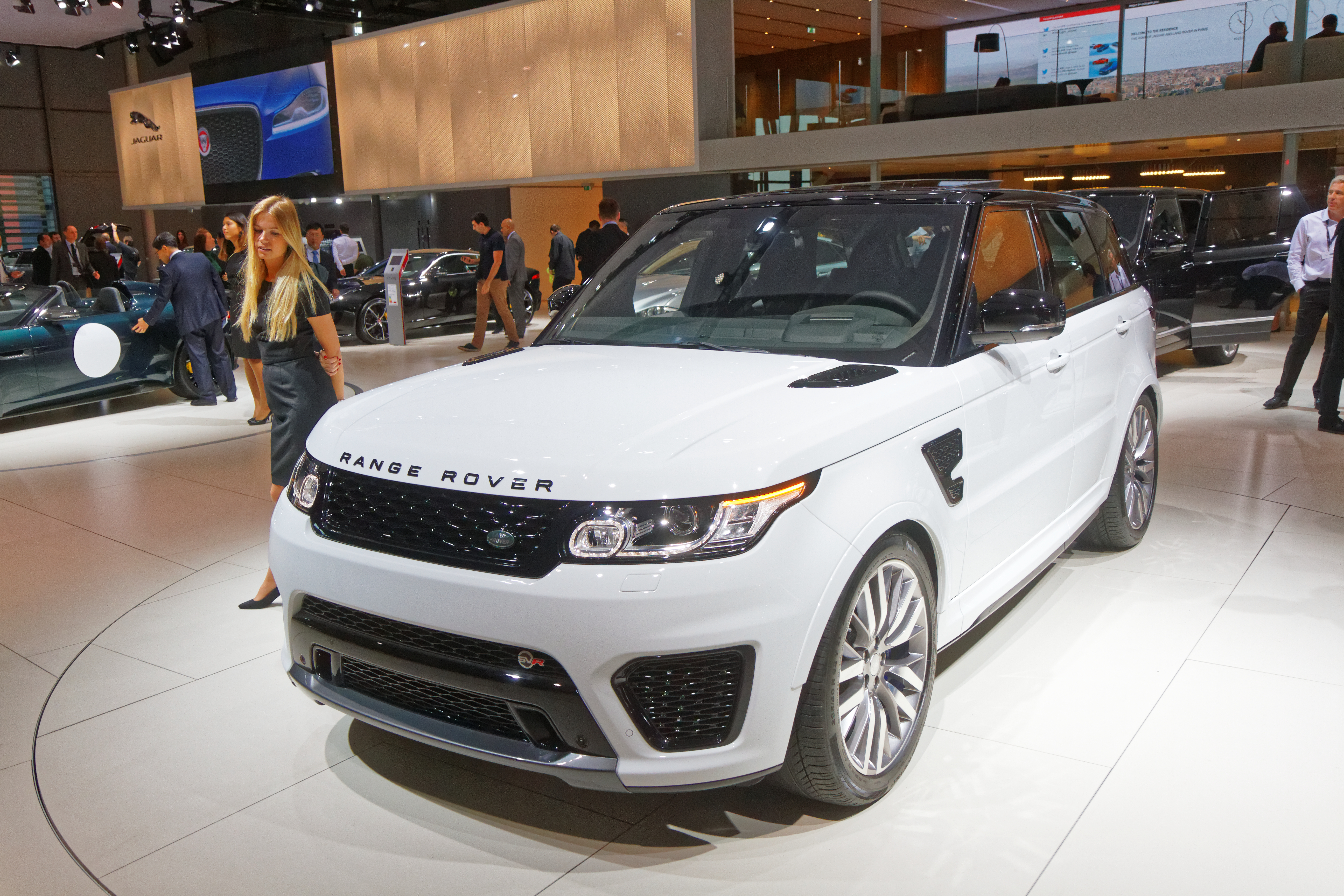 Une Land Rover SVR présentée lors du mondial de l'automobile de Paris 2014.